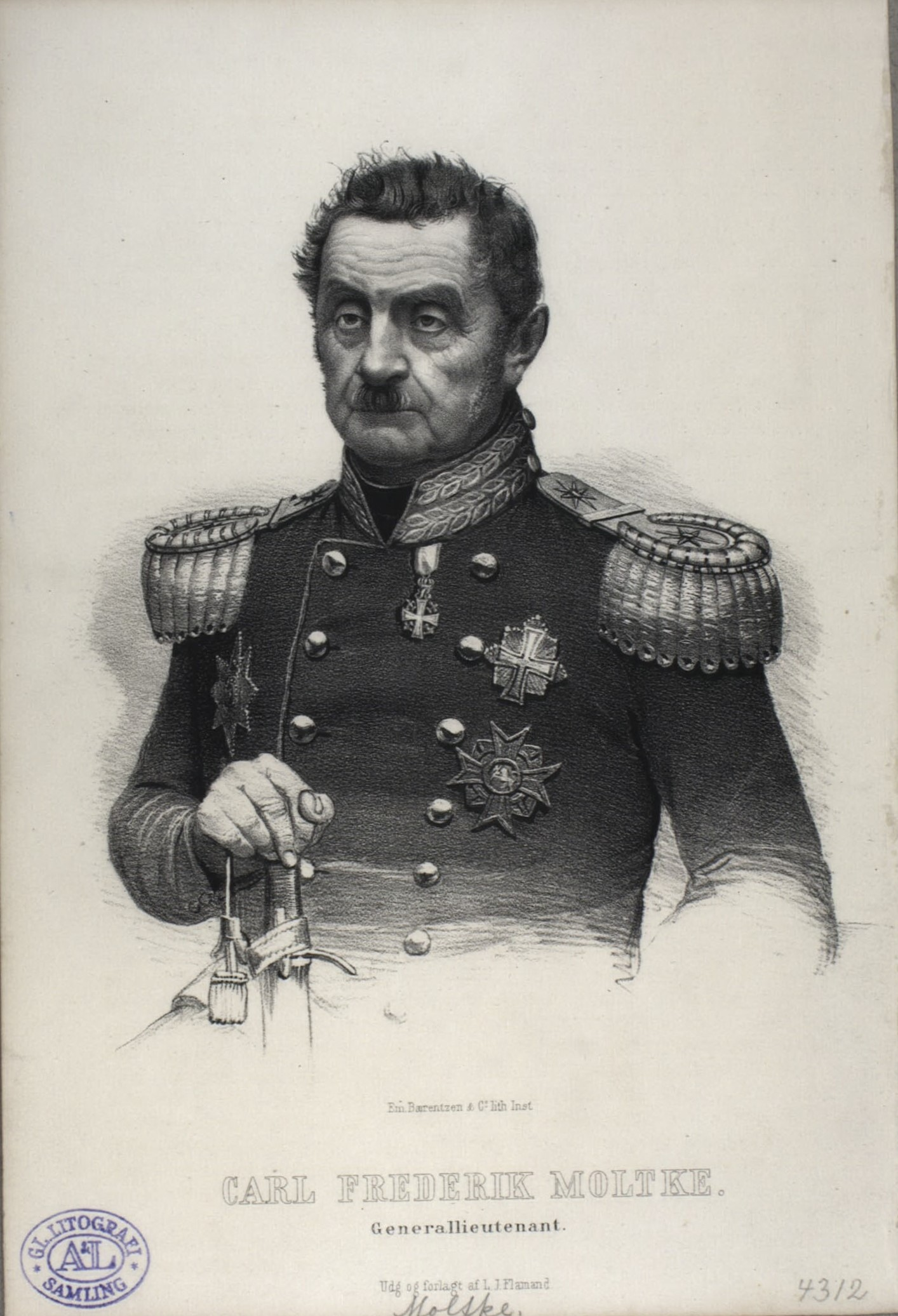 Anthon Carl Frederik Moltke (1784-1863), Danish general